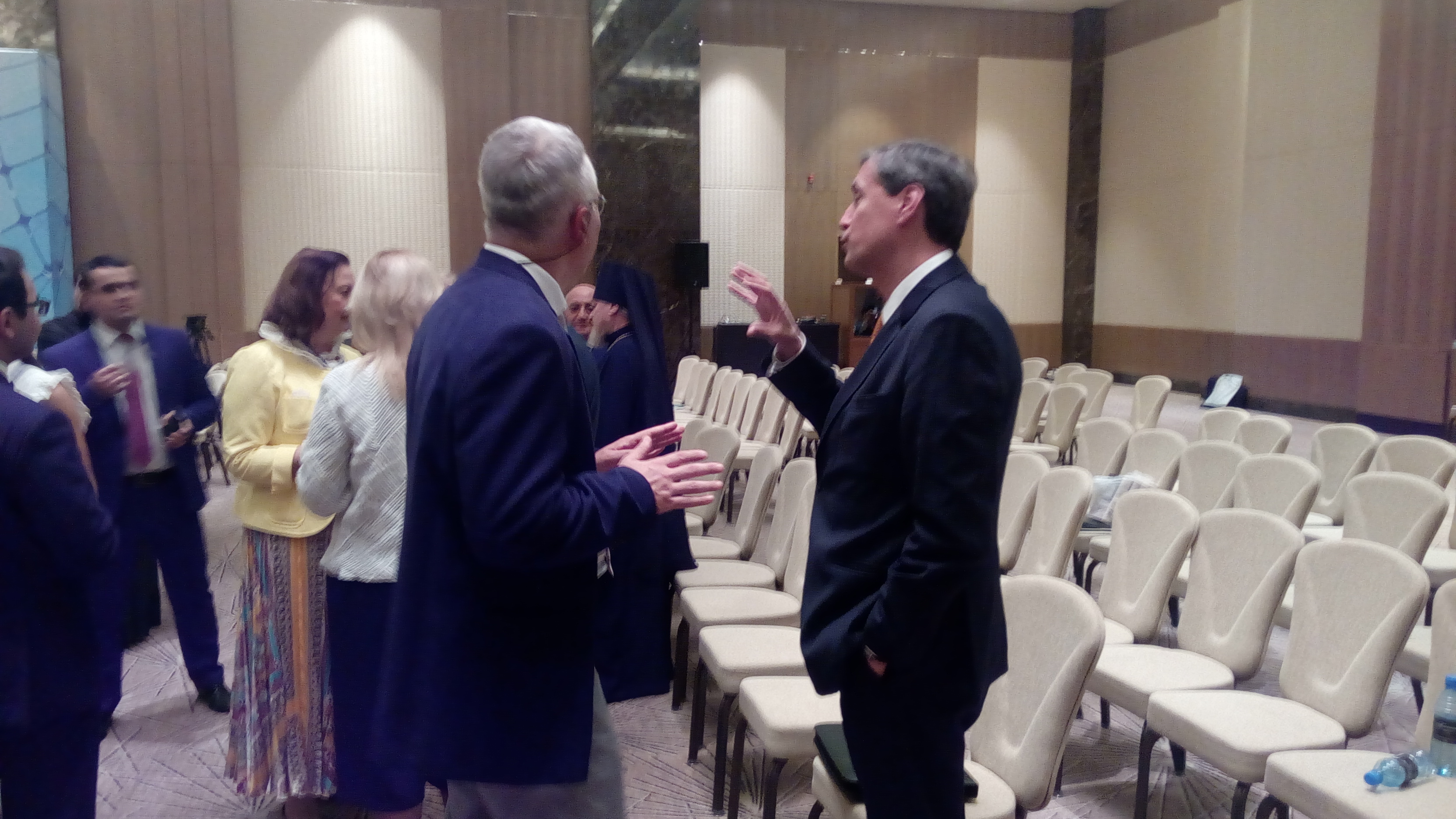 V Beynəlxalq Humanitar Forumunda